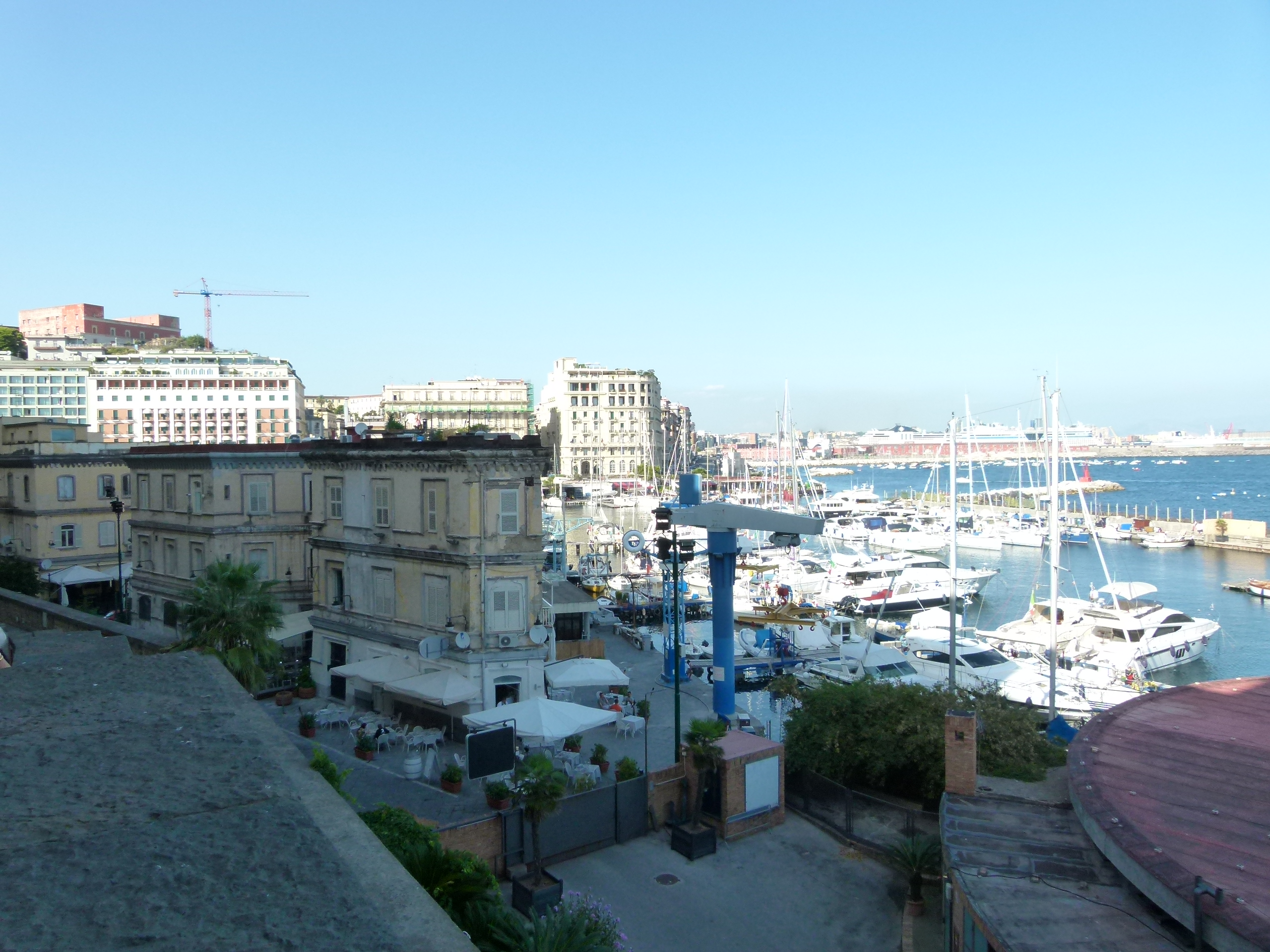 Armando Tripodi